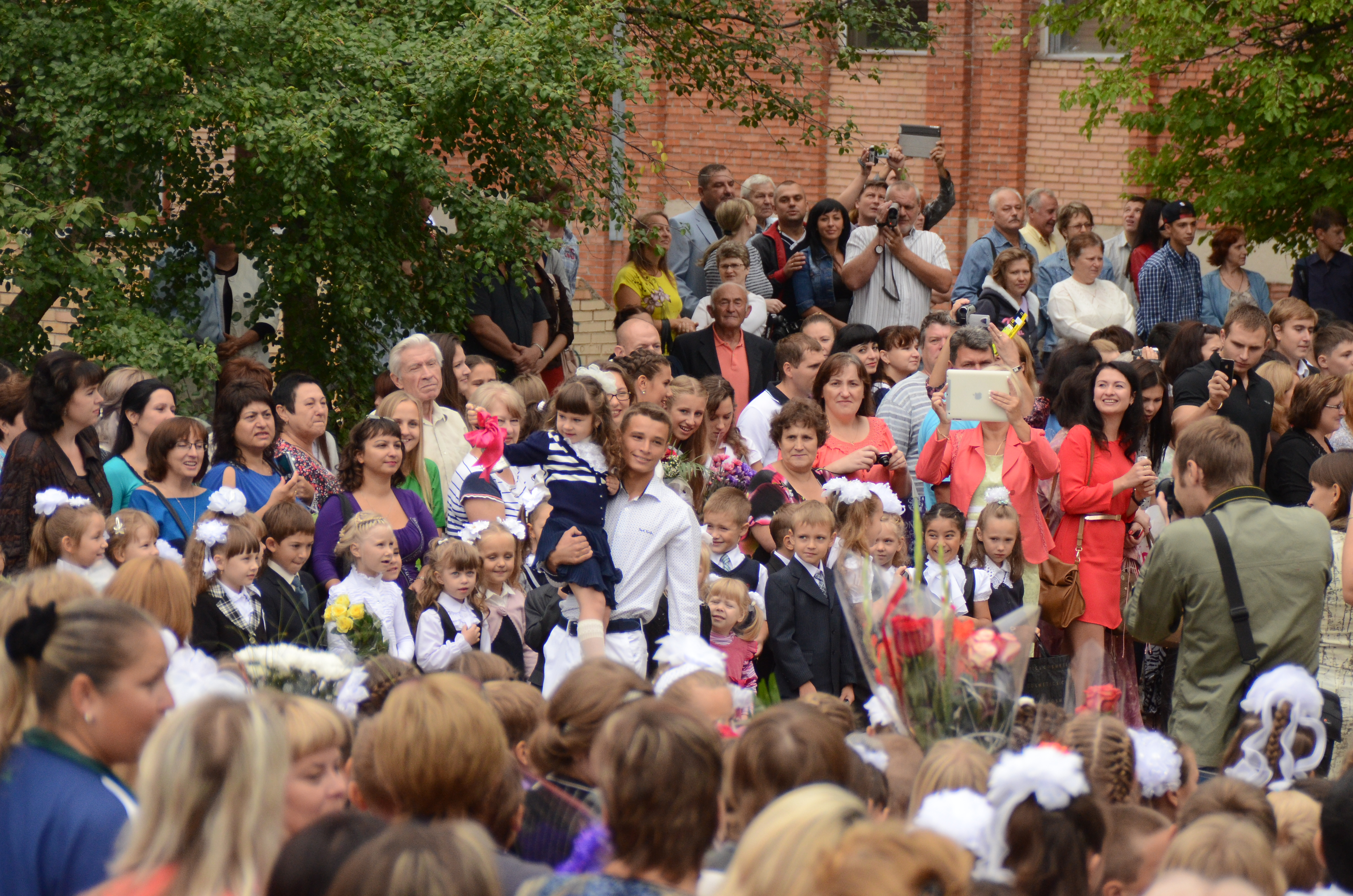 Донецк.